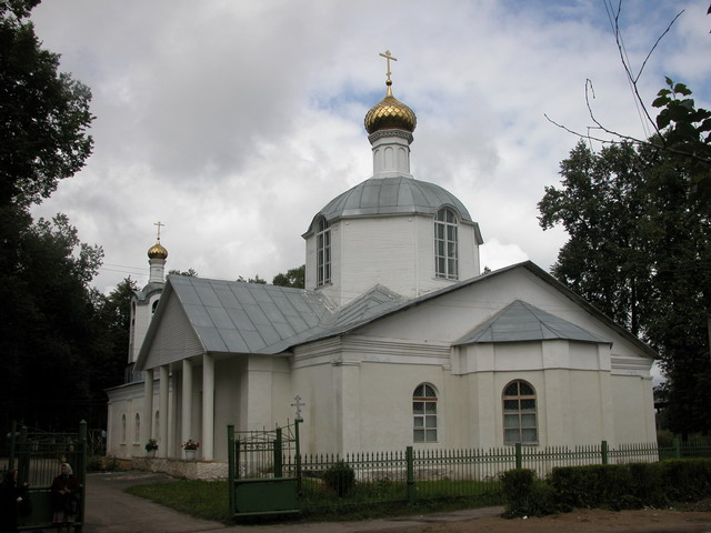 Церковь Преображения Господня в Струнино